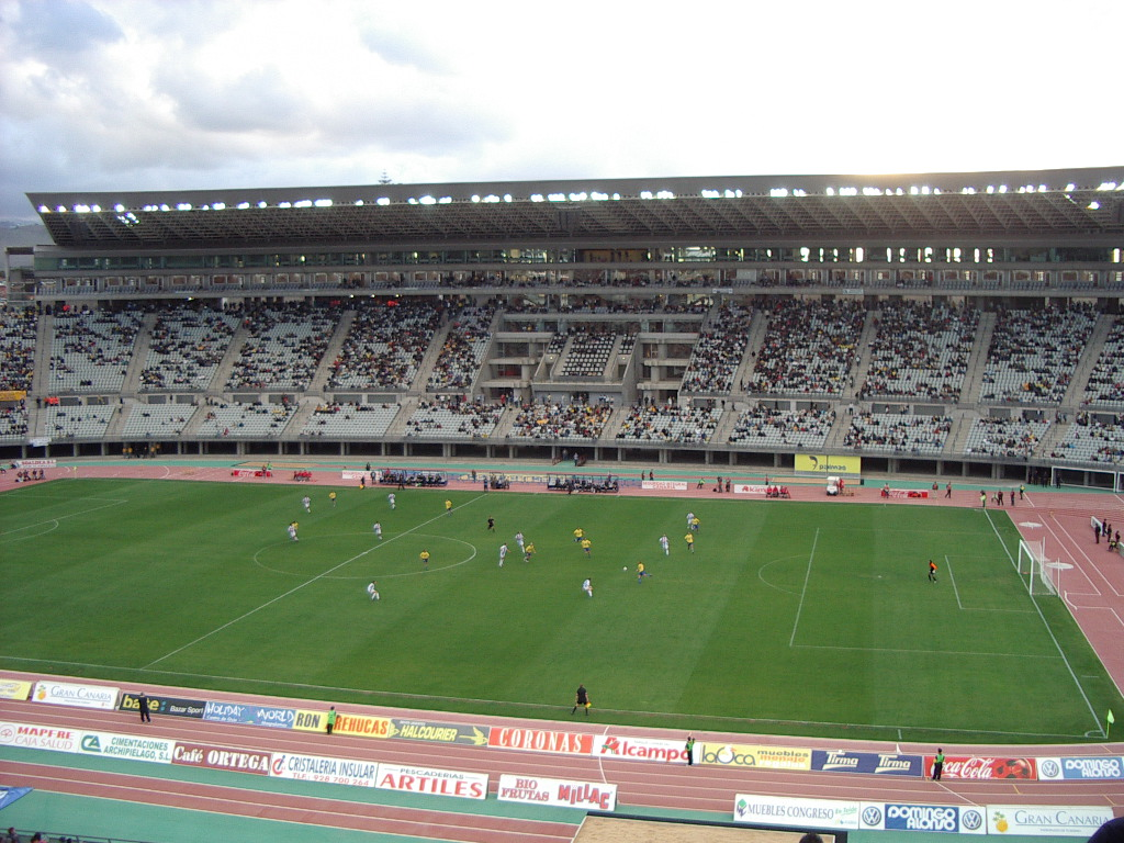 Vista del Estadio de Gran Canaria, durante el encuentro de fútbol UD Las Palmas - Alavés, el 11 de abril de 2004.